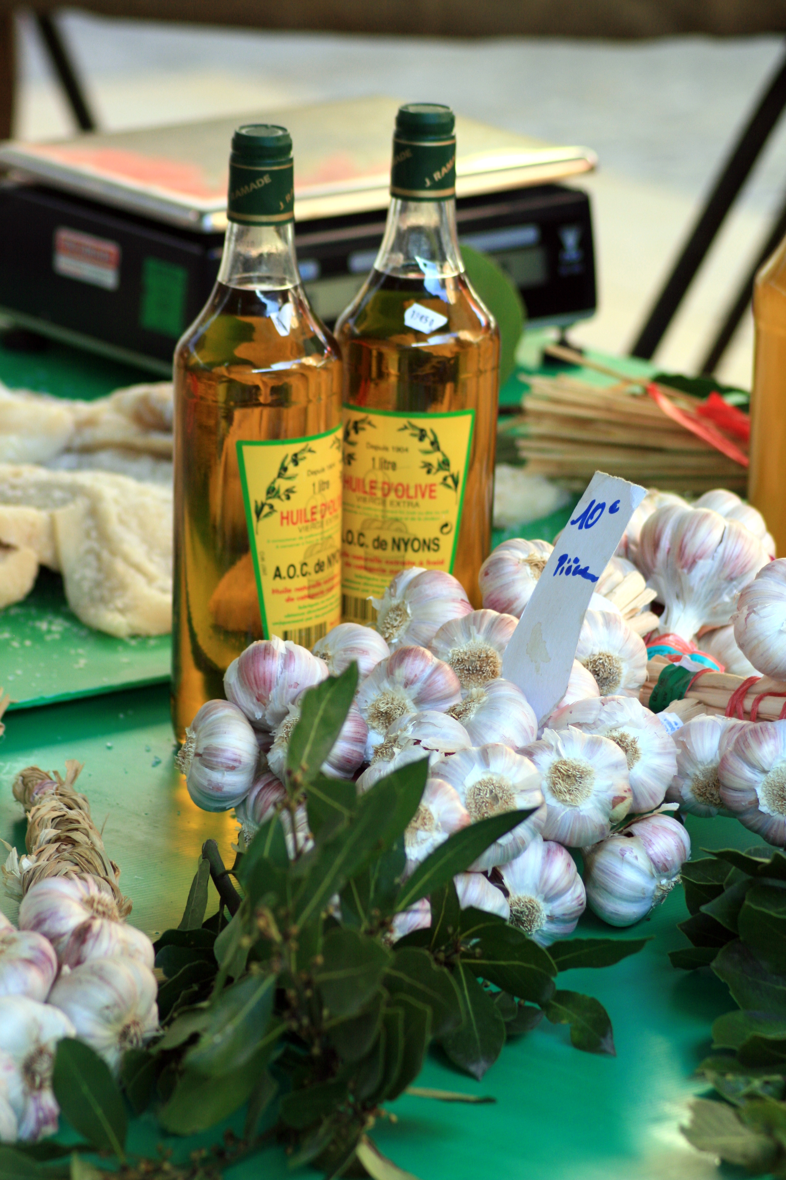 AOC Huile d'olive de Nyons, tresse d'ail et feuille de laurier-sauce, au marché du jeudi d'Orange